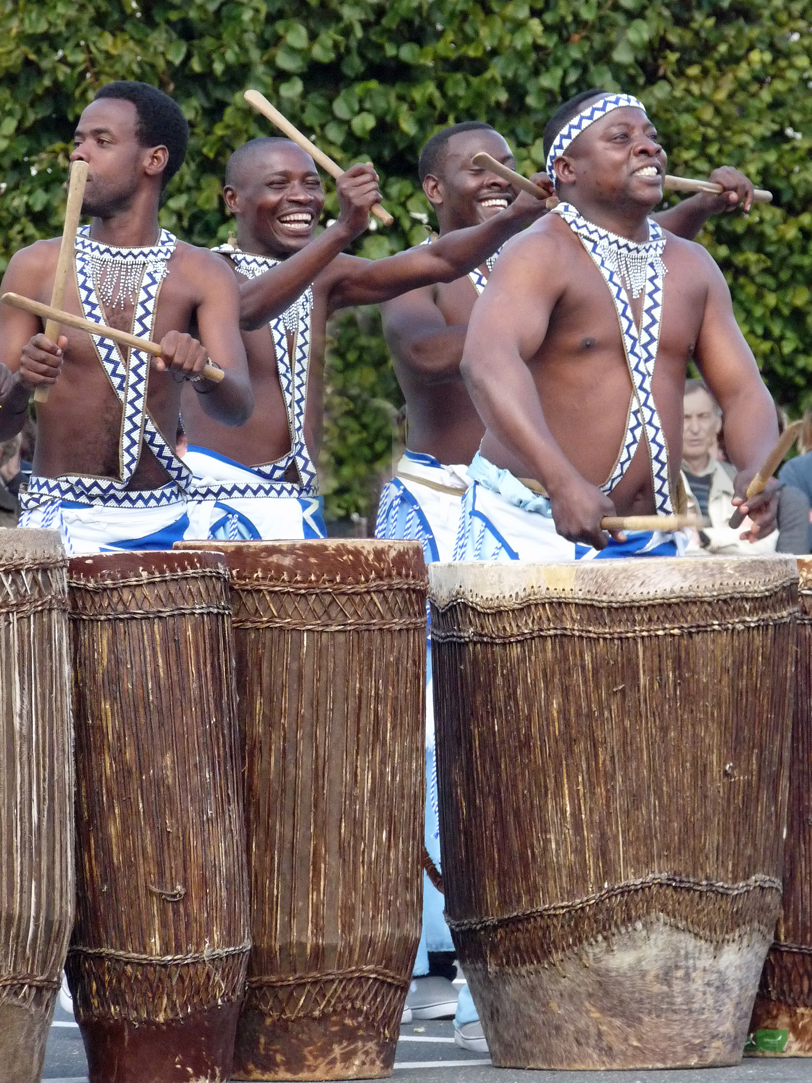 Tambourinaires du Ballet national du Rwanda se produisant dans le cadre du 22e Festival international de géographie de Saint-Dié-des-Vosges 2011